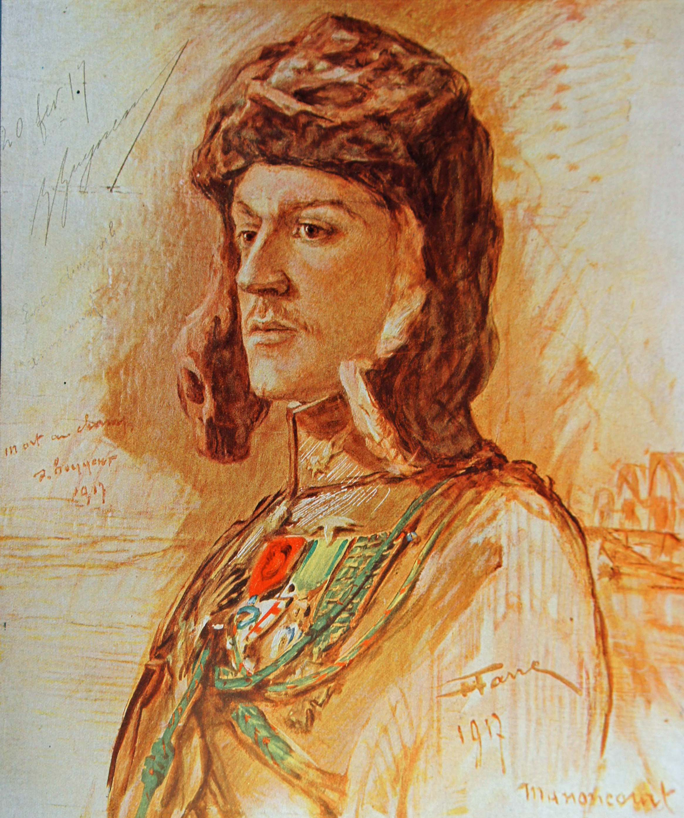 Portait de Georges Guynemer par Farré.